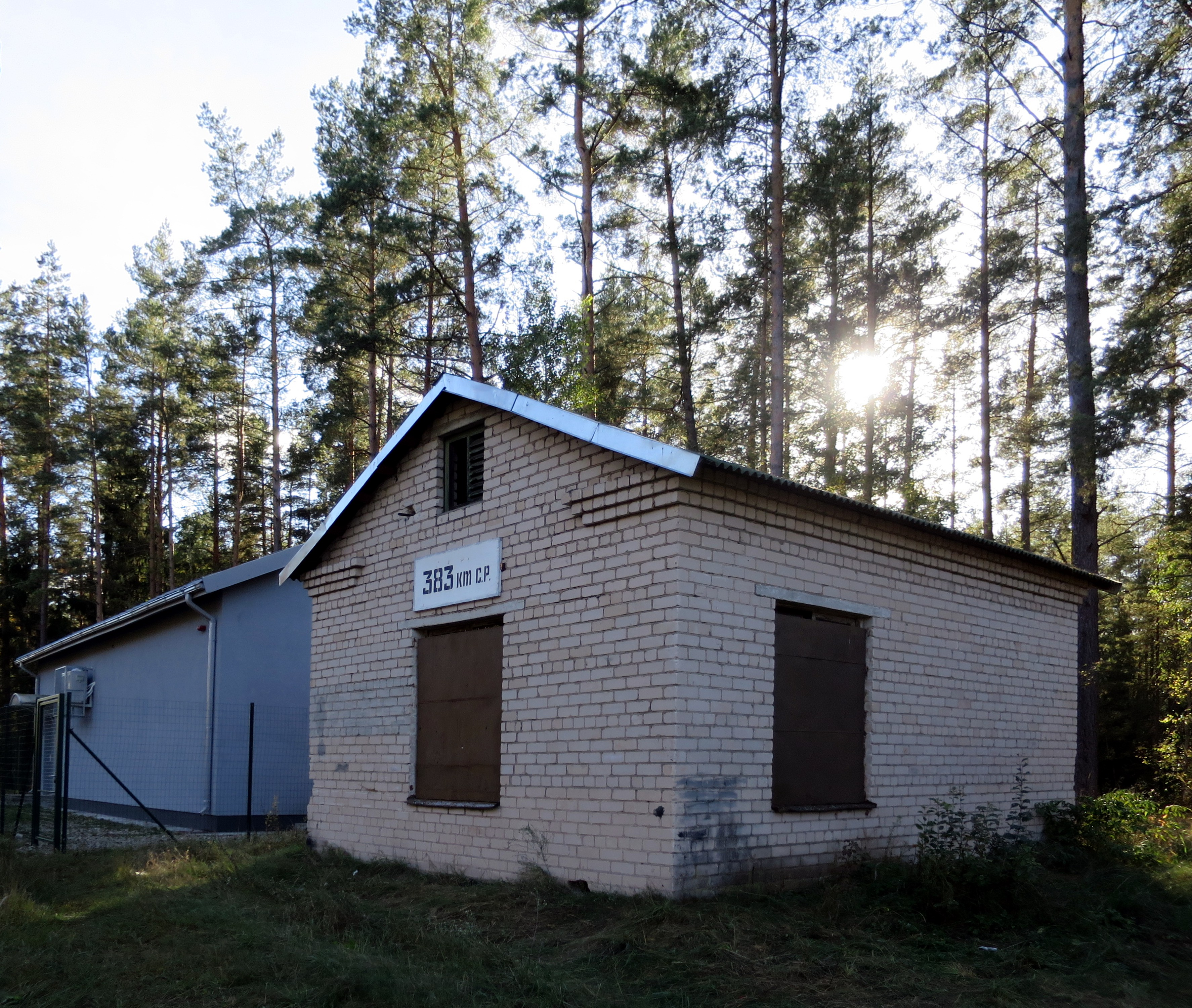 383. kilometra ceļa posteņa ēka